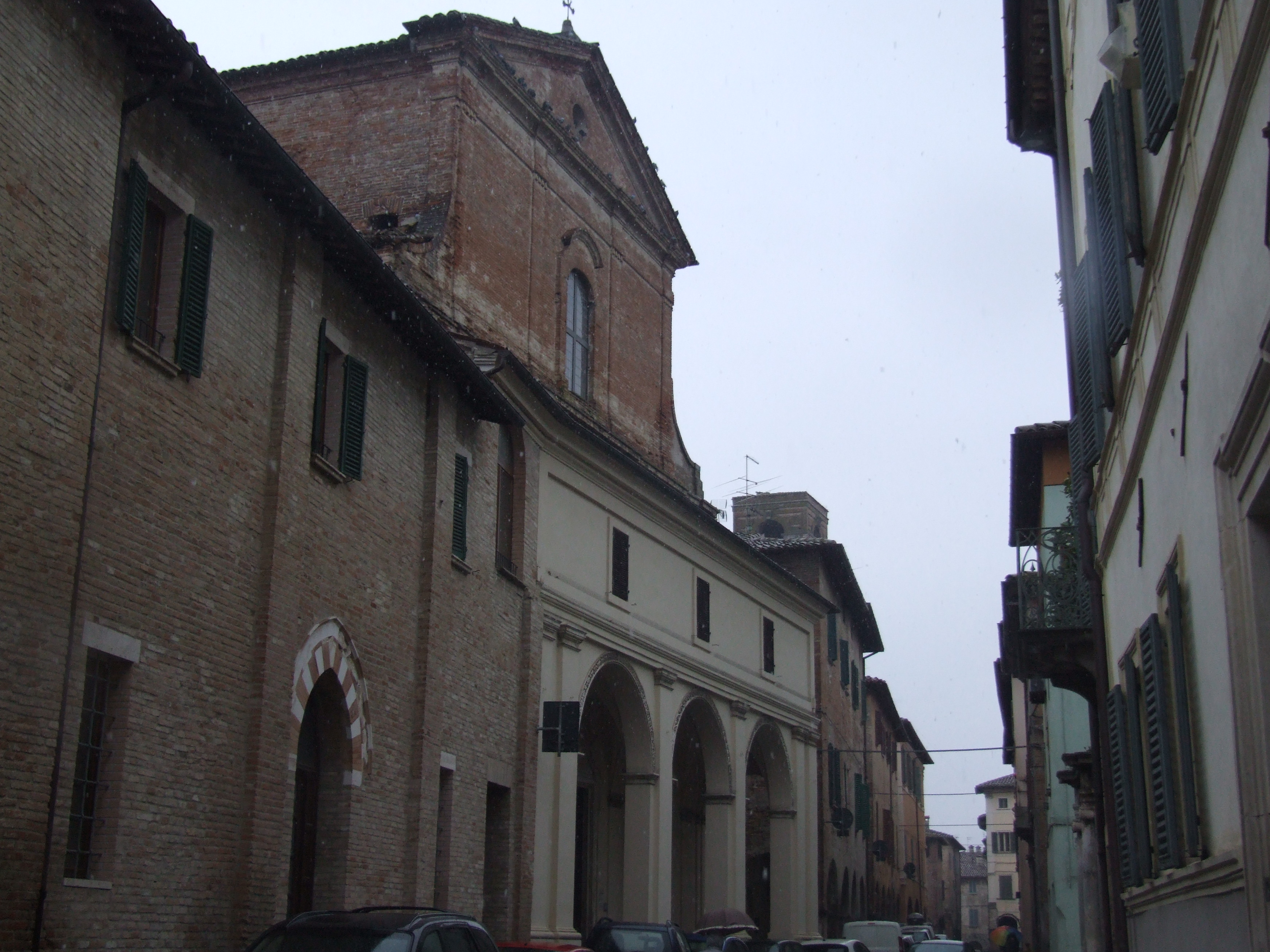 Chiesa di San Francesco This is a photo of a monument which is part of cultural heritage of Italy.